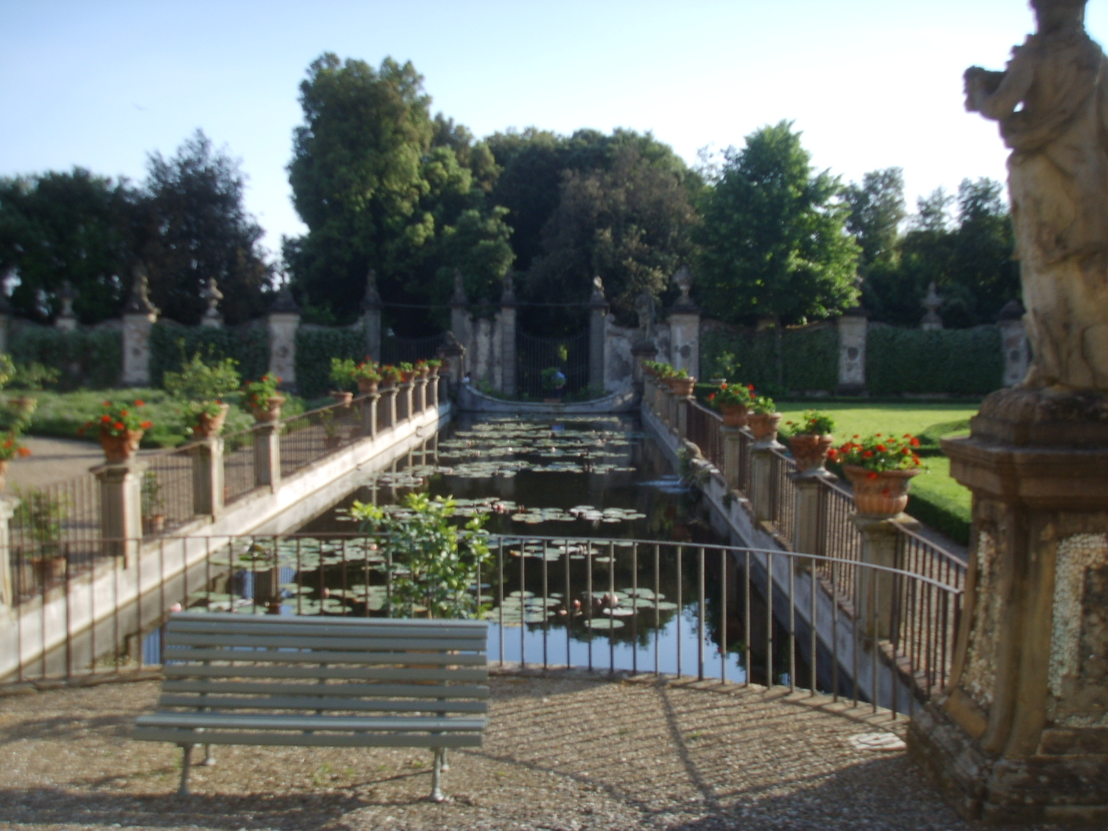 Villa guicciardini corsi salviati, peschiera 2